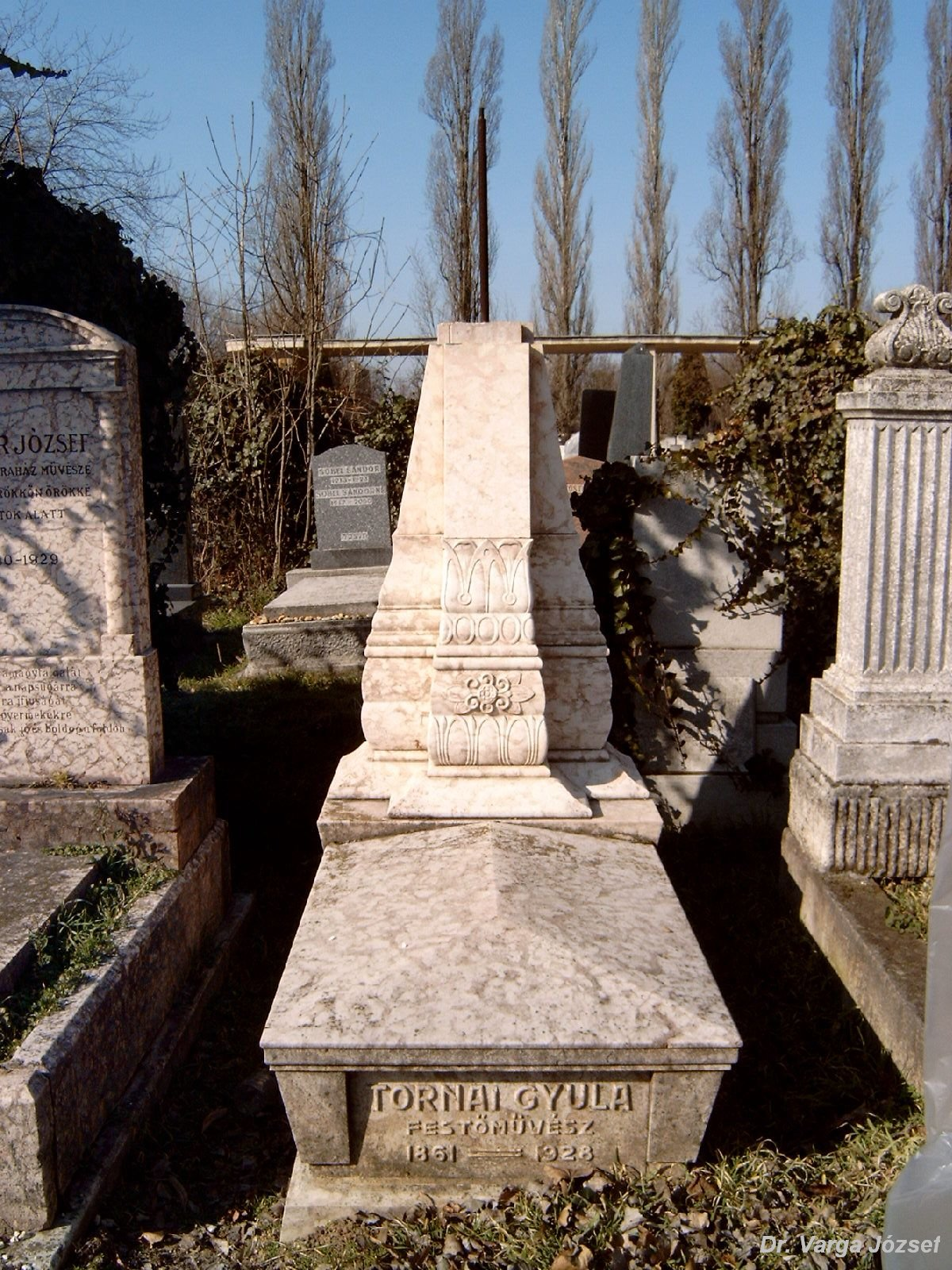 Tornai Gyula (Görgő, 1861. április 12. – Budapest, 1928. november 24.) festő sírja Budapesten. Kozma utcai izraelita temető: 5B-11-16.